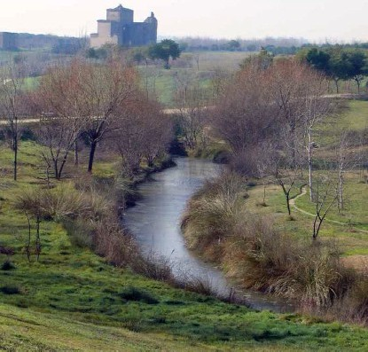 Arroyo Culebro a su pso por Leganés (Comunidad de Madrid), España